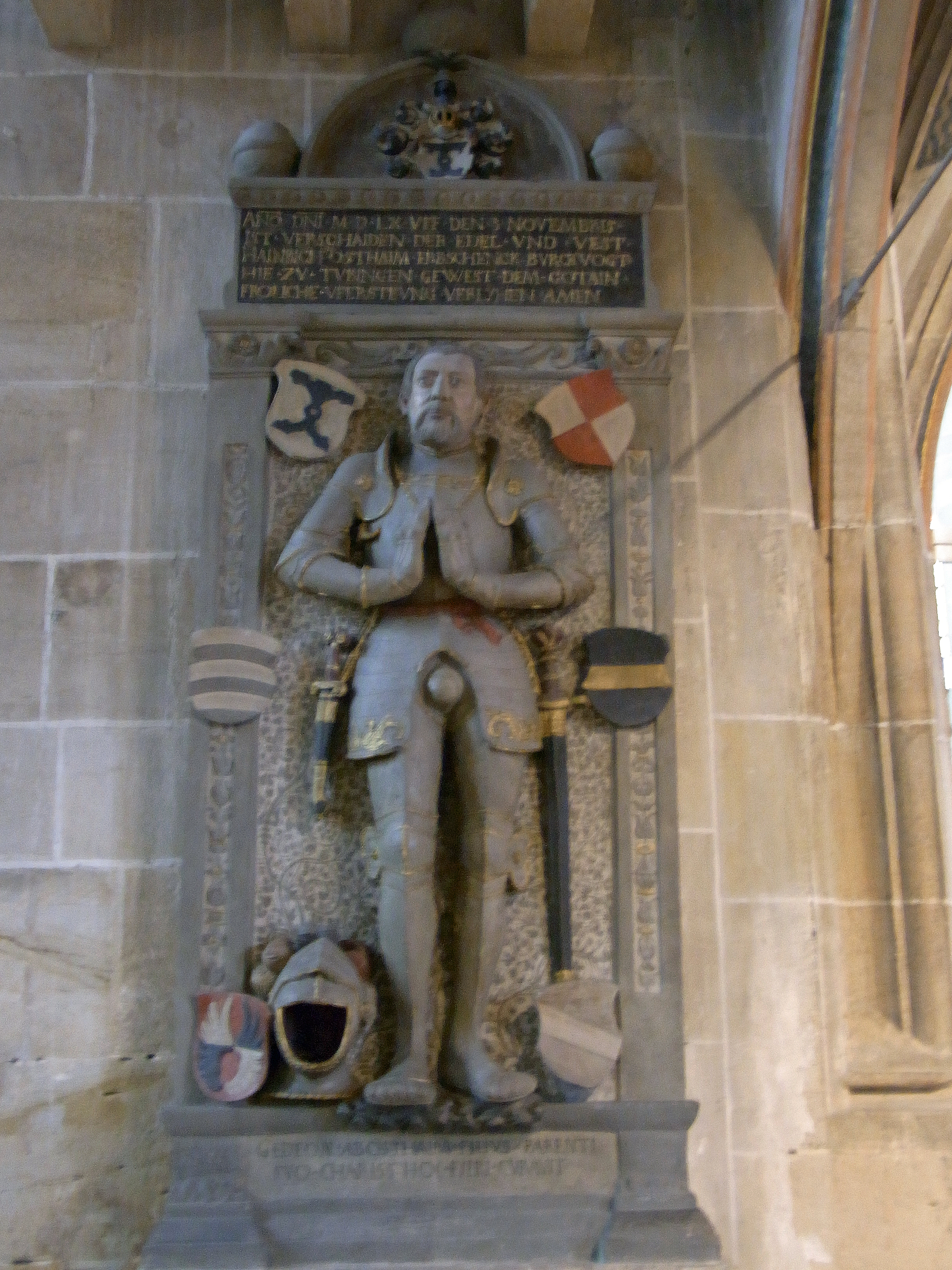 Stiftskirche St. Georg, Tübingen Heinrich von Ostheim (+1560) Figurengrabmal (Leonhard Baumhauer)